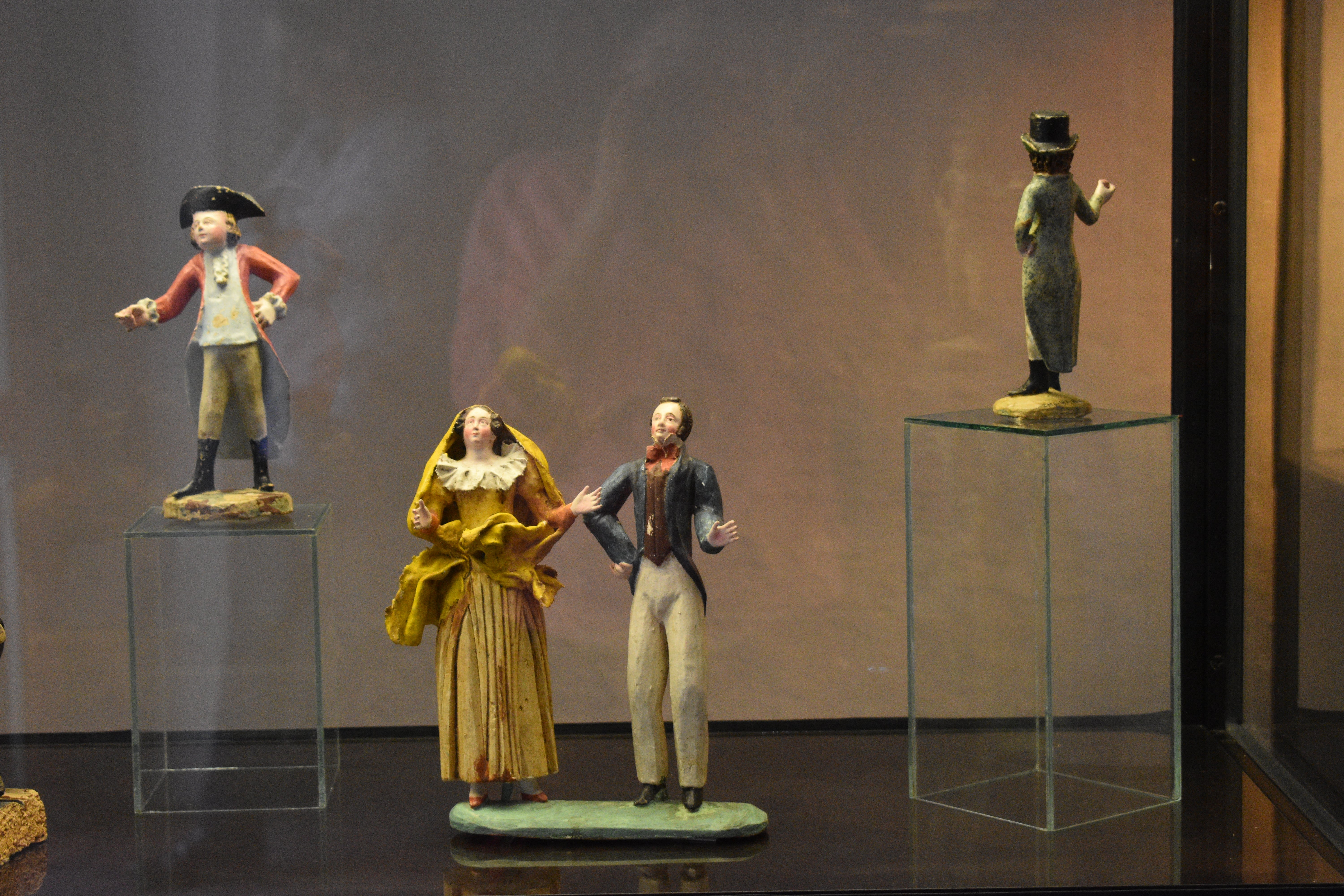 Juguetes